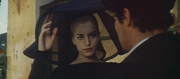 Scena del film